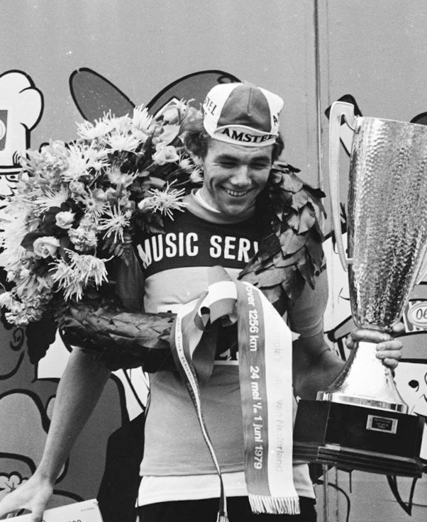 Jos Lammertink